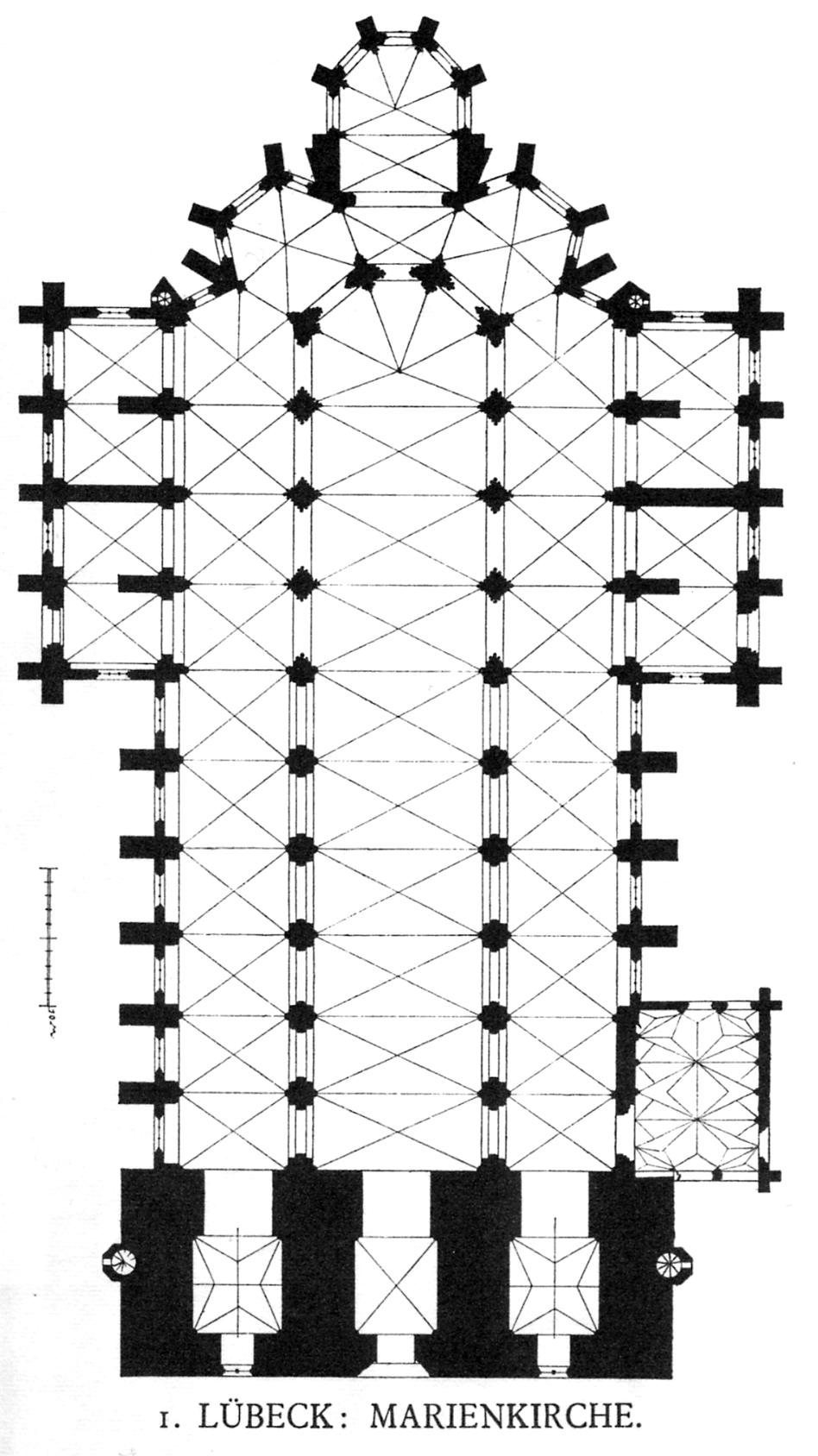 Lübeck, Marienkirche